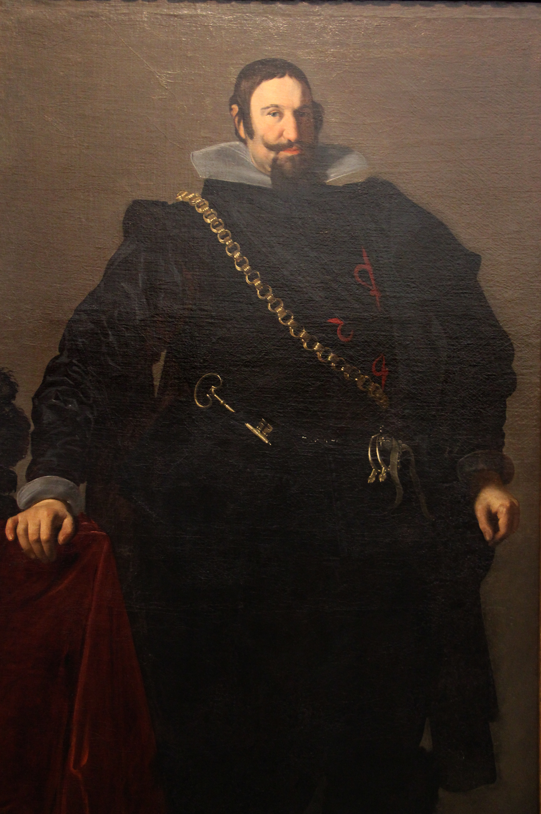 Museu de Arte de São Paulo